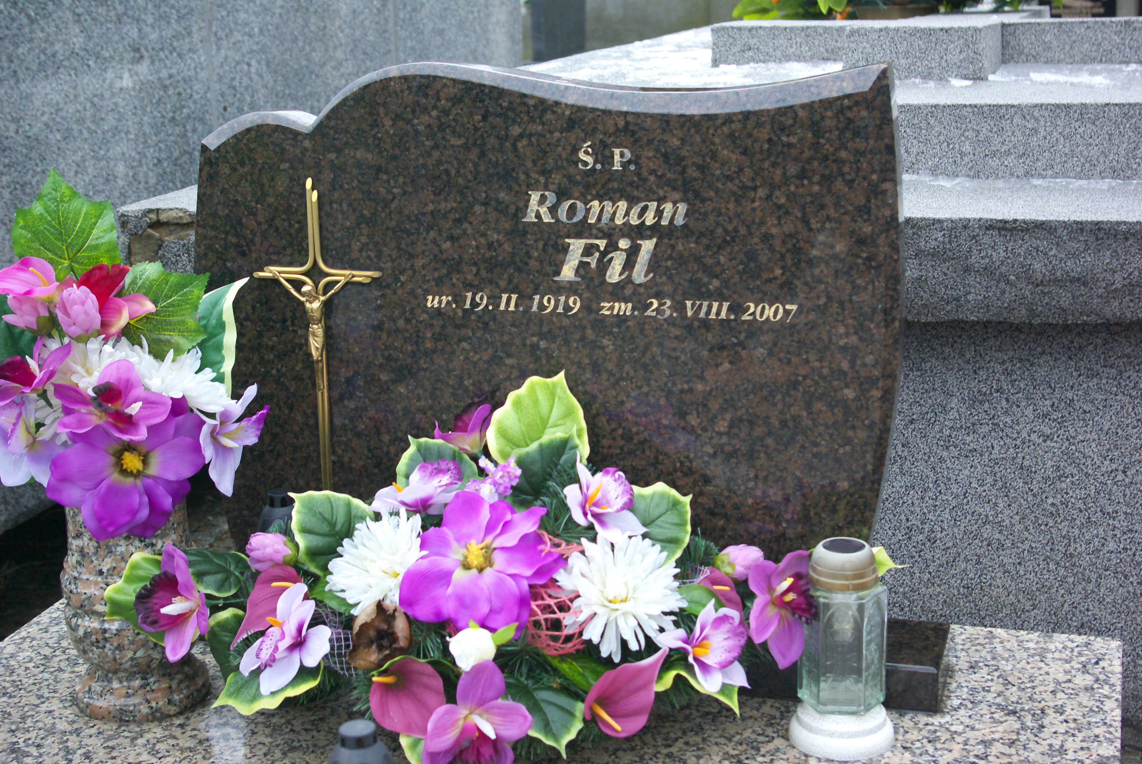 Nagrobek Romana Fila w części „Rymanowski Stary” Cmentarza Centralnego w Sanoku.